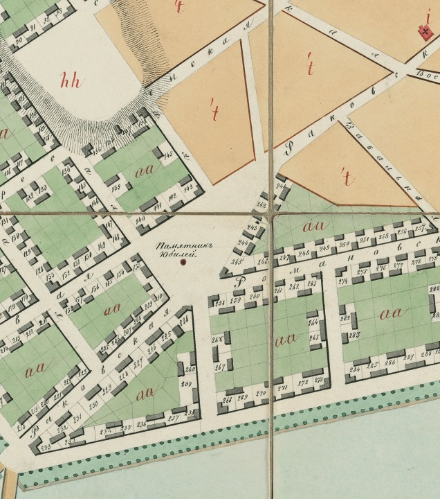 Беларуская (тарашкевіца): Менск (Miensk), пляц Юбілейны (plac Jubilejny). Плян